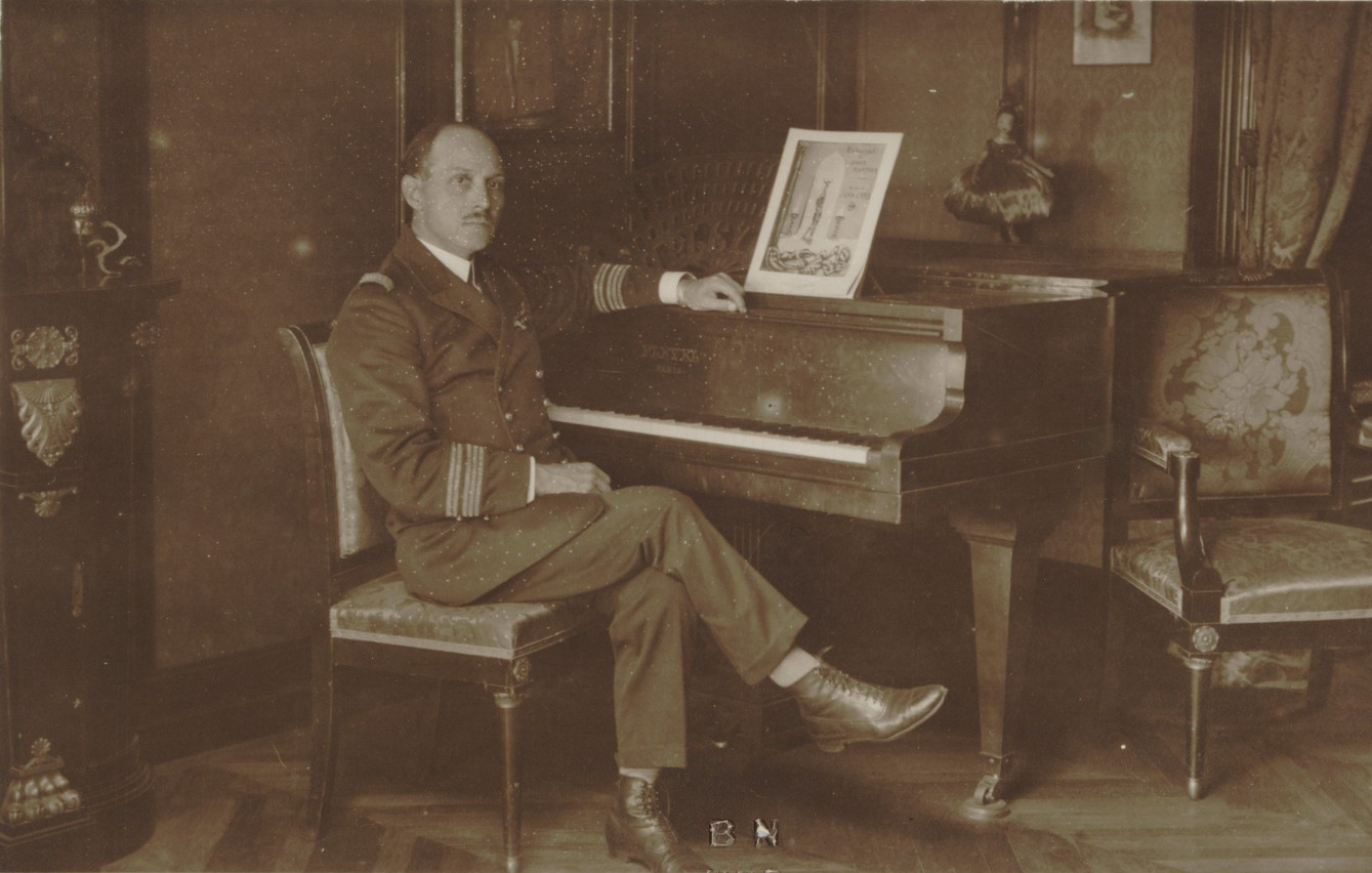 Jean Cras, capitaine de vaisseau [1879-1932], photo prise en 1930